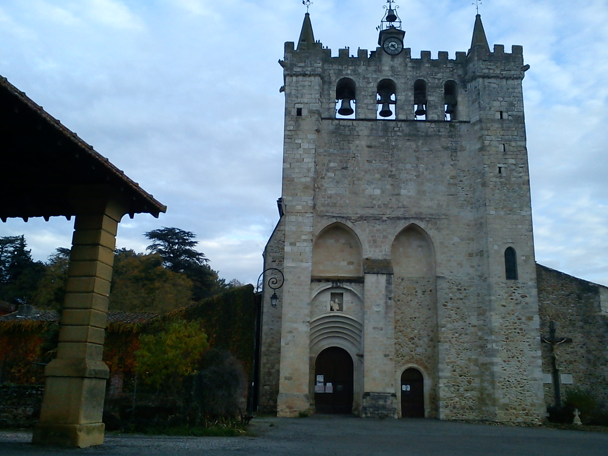 Église Saint-Pierre du Plan (Haute-Garonne)